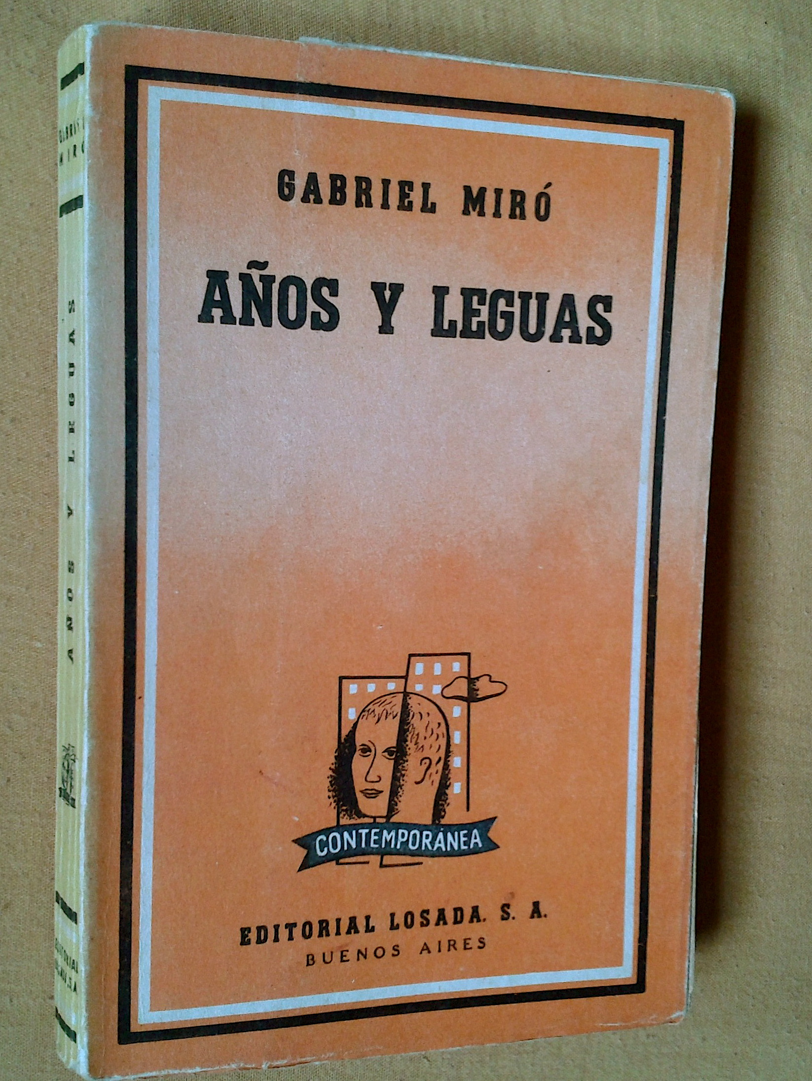 Portada de "Años y leguas", de Gabriel Miró, en su primera edición americana (Buenos Aires, 1958)